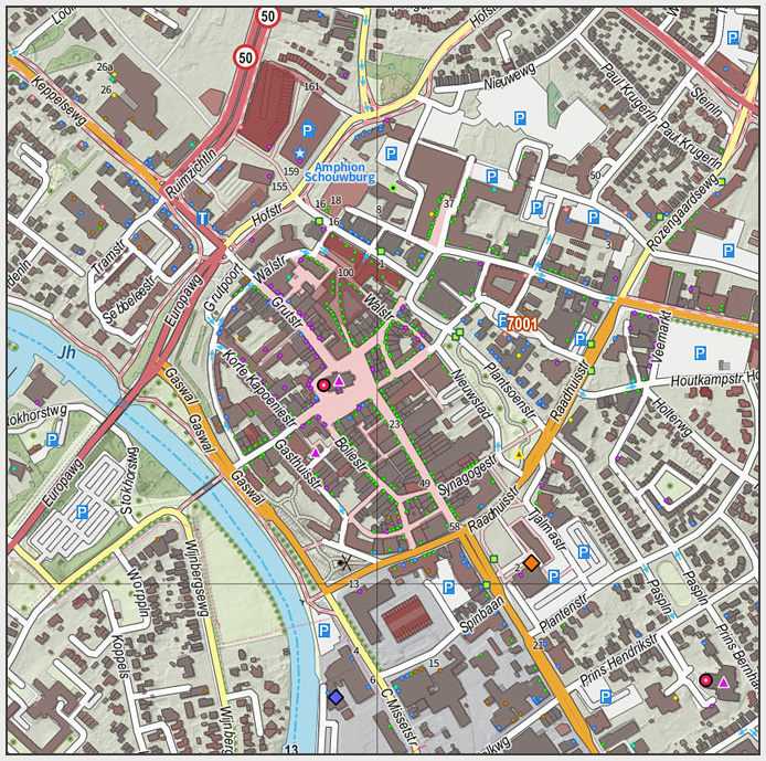 Topografische kaart van Doetinchem (centrum van woonplaats). Resolutie: 640 pixels/km. Kaartbeeld samengesteld uit de open geodata van de Top10NL en Top25namen (Basisregistratie Topografie, Kadaster), Creative Commons BY licentie. Gebouwvlakken uit open geodata BAG extract. Wegen uit de OpenStreetMap. Reliëfschaduw uit de Actuele Hoogtekaart AHN2. Samenstelling en kleurenschema: Jan-Willem van Aalst, met QGIS2. Zie ook de Legenda.